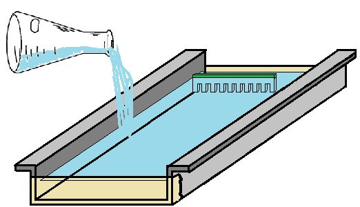 Esquema de preparación de un gel de electroforesis horizontal, típicamente empleado con agarosa para correr ácidos nucleicos. La placa que se observa se introduce a continuación en una cubeta rellena de tampón de electroforesis y conectada a los electrodos.